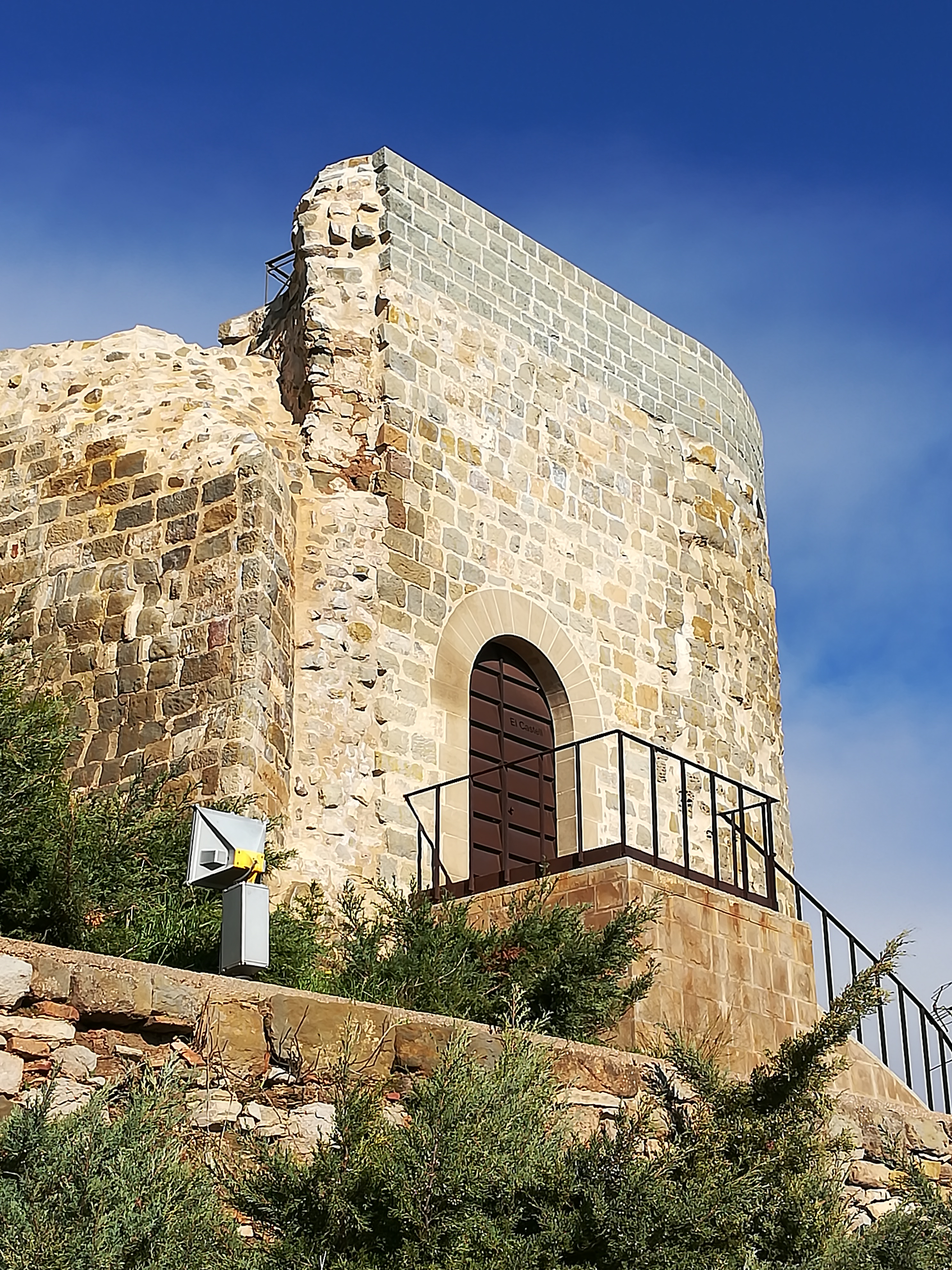 Castell de Calaf